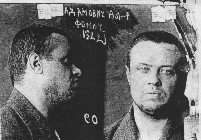 фатаграфія Аляксандра Фаміча Адамовіча з крымінальнай з справы № 20950-c